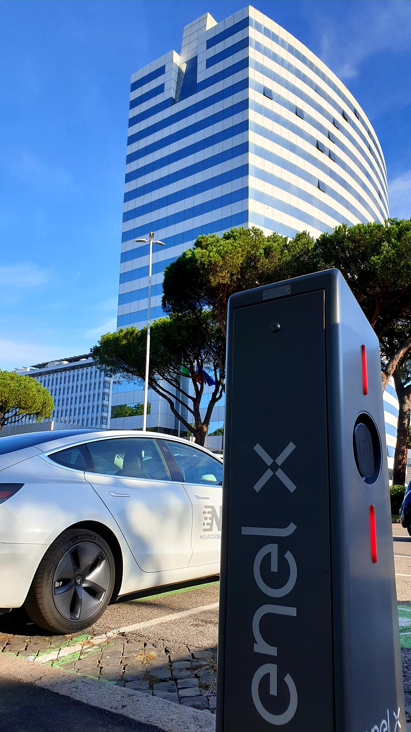 Colonnina di ricarica Enel X a Roma